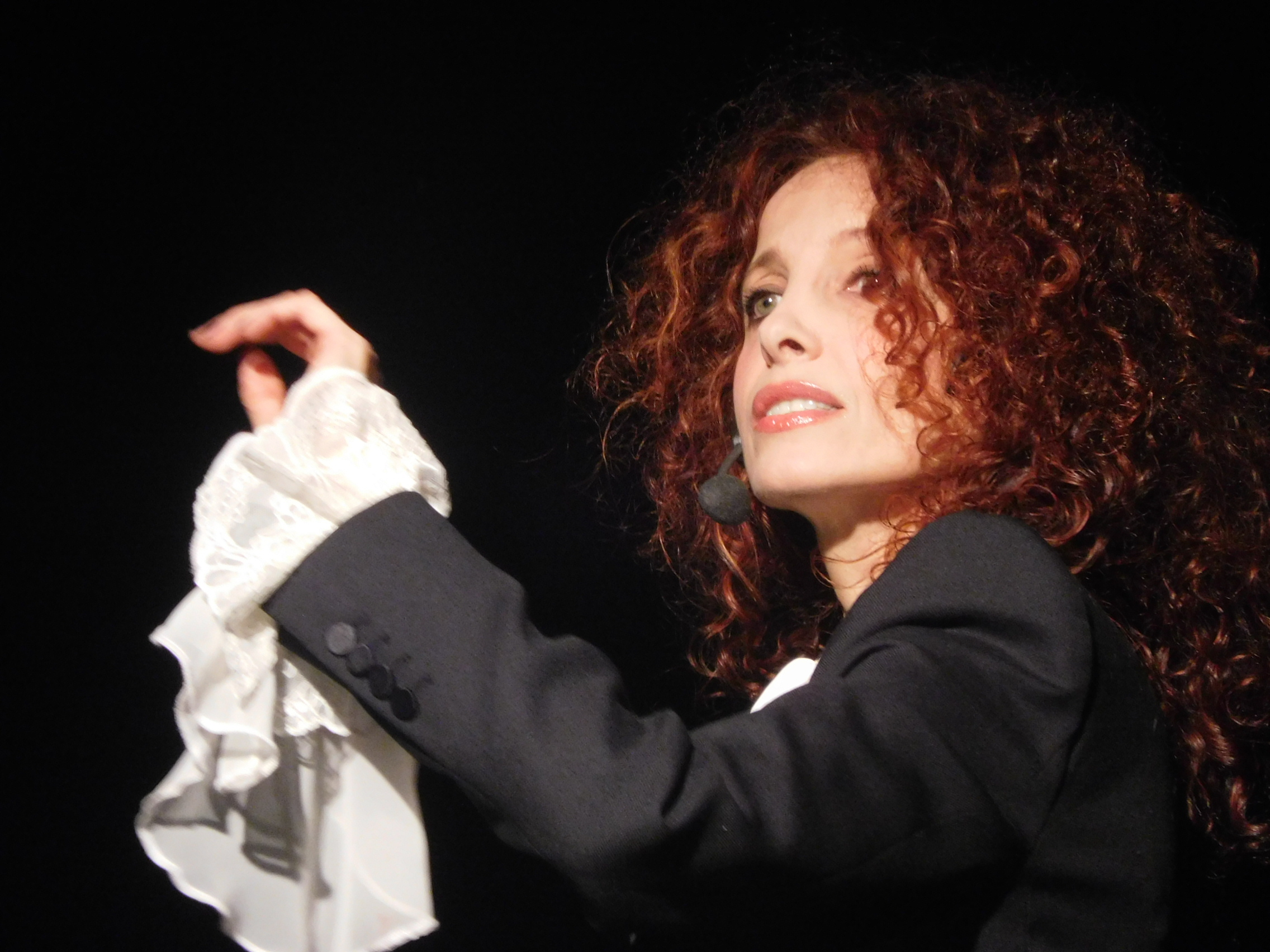 Rossella Seno in "Cara Milly" all'Auditorium G. Pierluigi di Palestrina nel 2015